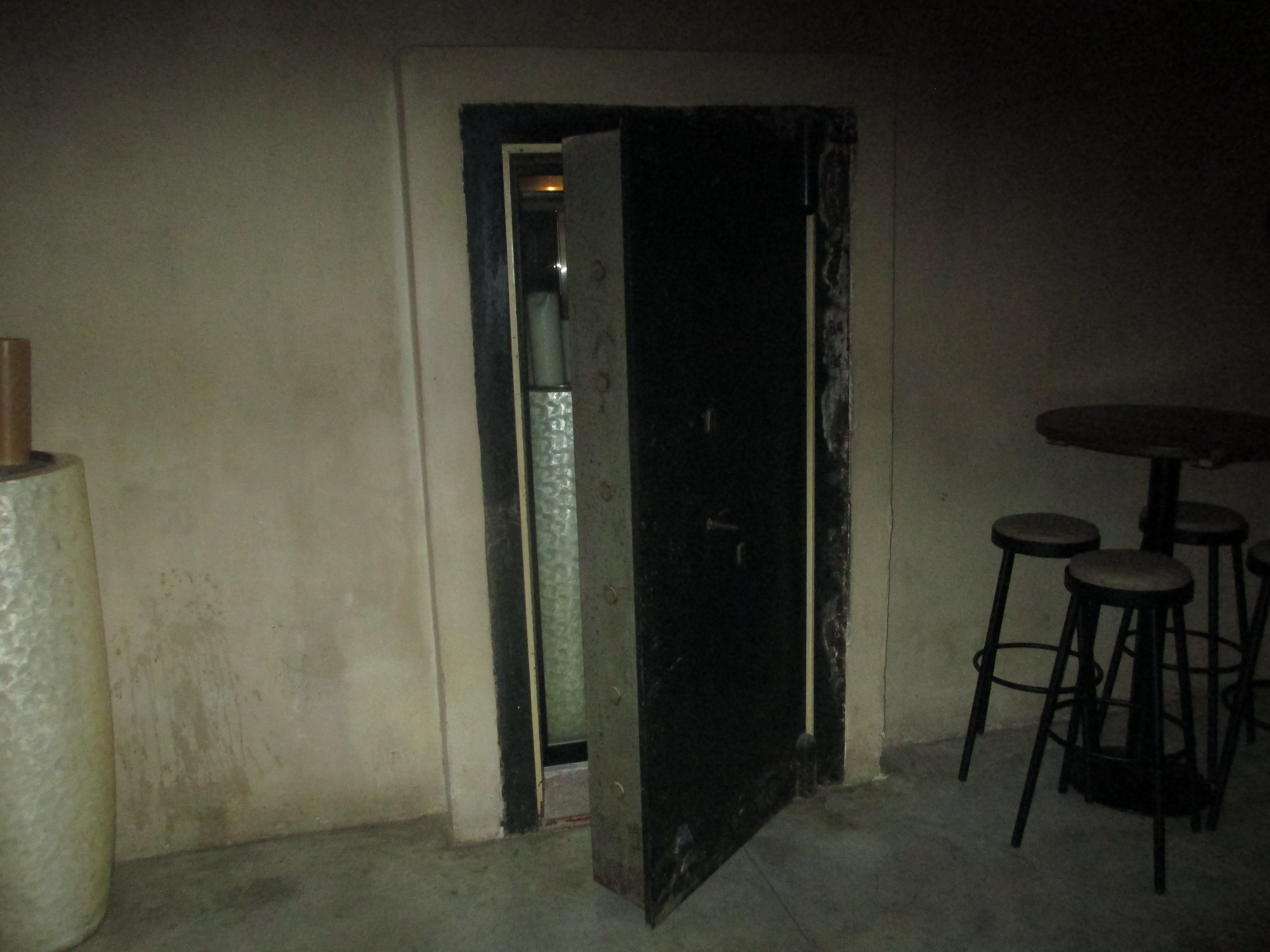 דלת הכספת של בנק ישראל במתחם שרונה